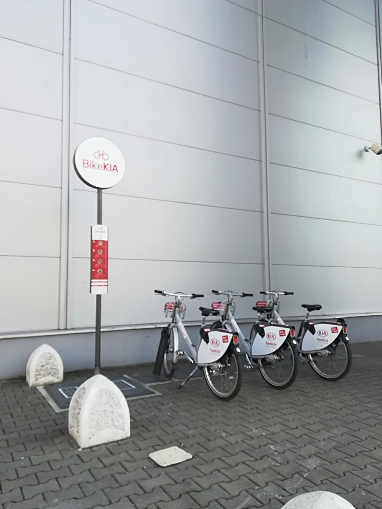 Stanovište BikeKia pri OC Max v Žiline